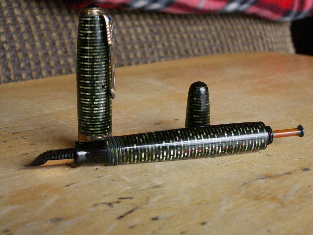 Parker penholder